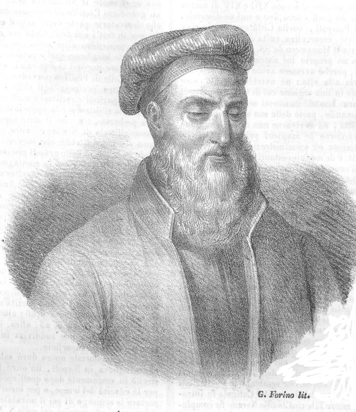 autore:G.Forino litografo, da Poliorama Pittoresco n.22 dell'11 gennaio 1840, ritratto di Andrea Alciato, autore, opera il cui autore è morto da più di 70 anni, acquisita da scanner.